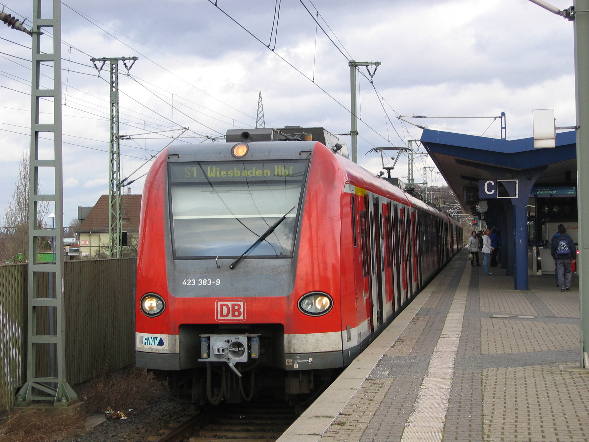 Train type 423 in Offenbach am Main-Ost, Germany, line S1 to Wiesbaden, platform 3 / Baureihe 423 in Offenbach am Main-Ost, Linie S8, Gleis 3